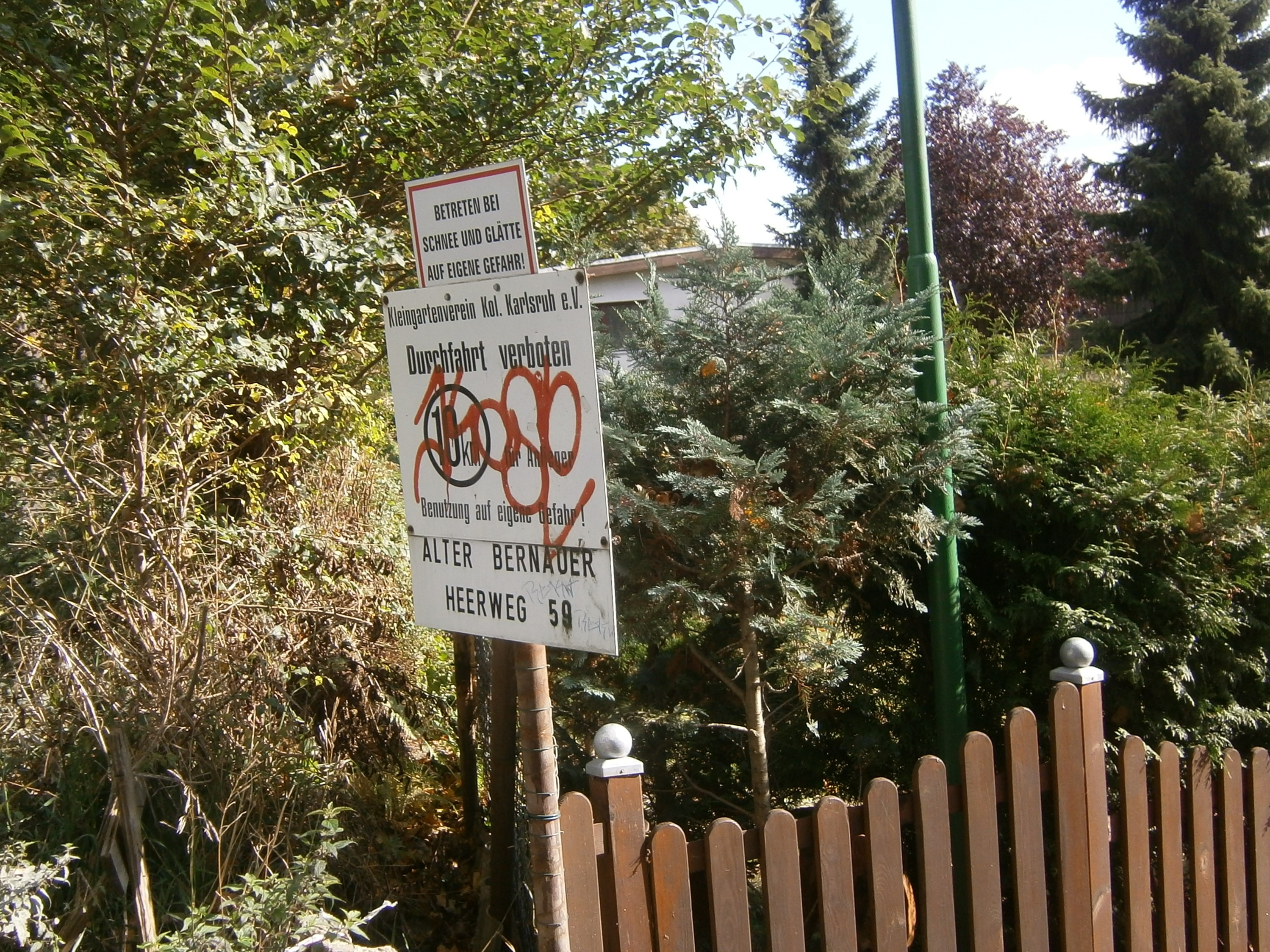 Die Blankenfelder Chaussee ist eine Straße in Berlin-Lübars. Sie liegt nördlich der Trasse der Bernauer Heerstraße. Hier der Blick zur Siedlung Karlsruh, deren Grundstücke zum Alten Bernauer Heerweg (vormals Wittenauer Straße) hin an der Ortsteilgrenze (zwischen 1961 und 1990 als Staatsgrenze zwischen Ost- und West-Berlin.